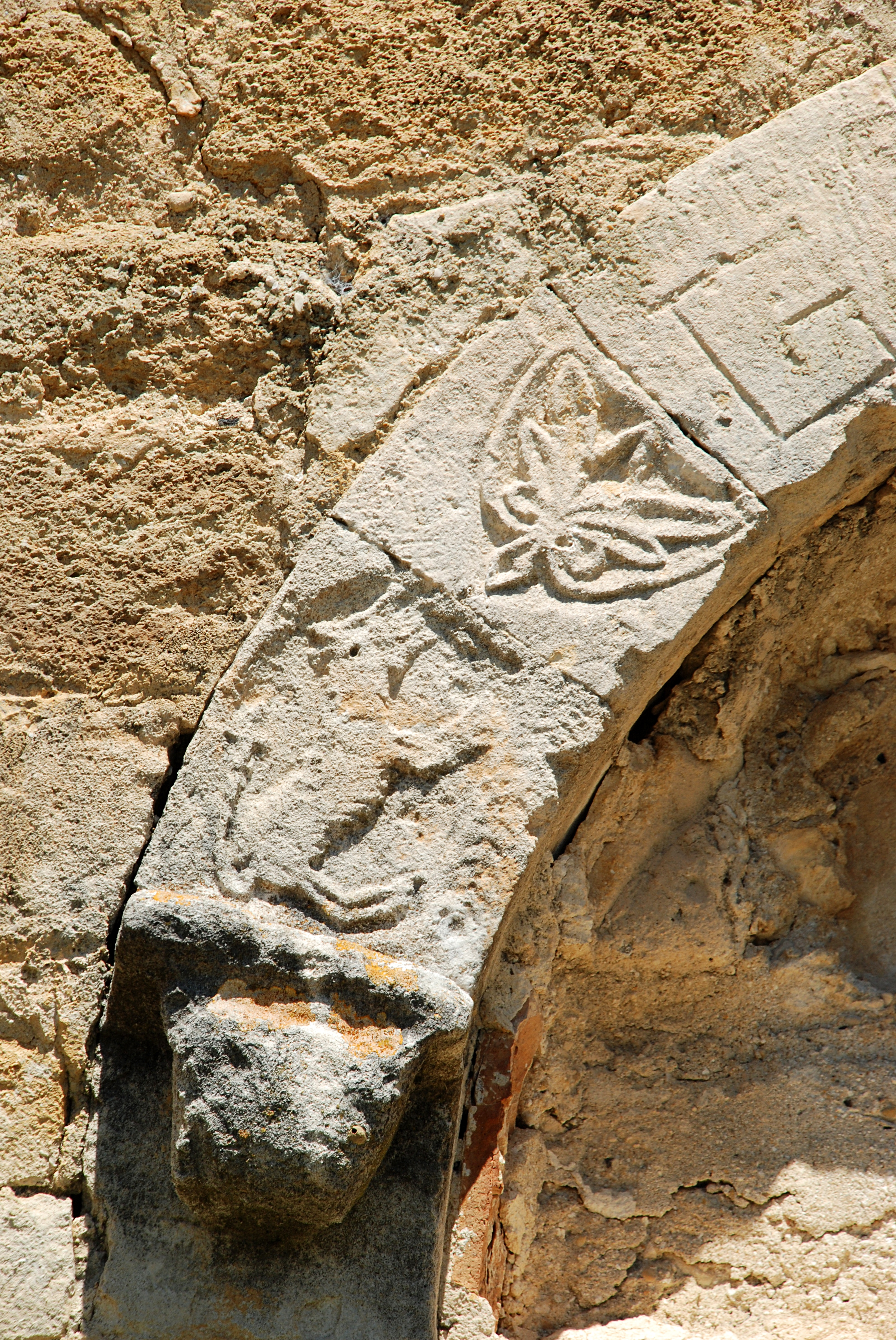 France - Drôme - Église Saint-Pierre-ès-Liens de Colonzelle